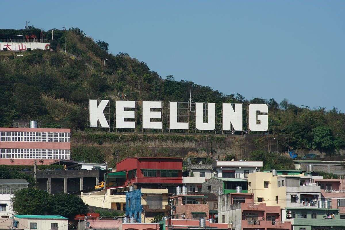 ハリウッドのような基隆プレート